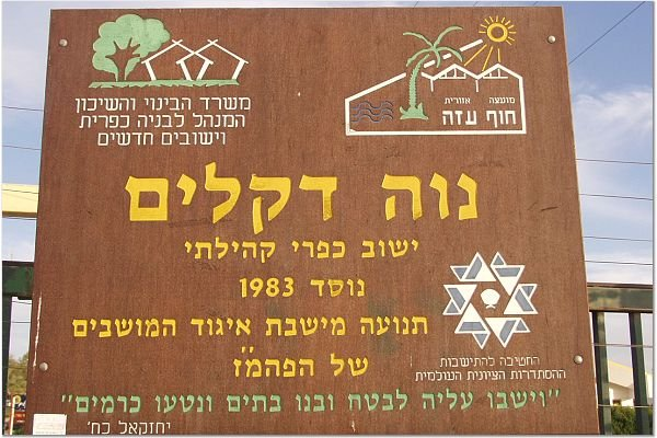 נוה דקלים התמונות באדיבות קטיף.נט (קישור) אתר האינטרנט של גוש קטיף. צולם על ידי מוטי סנדר.